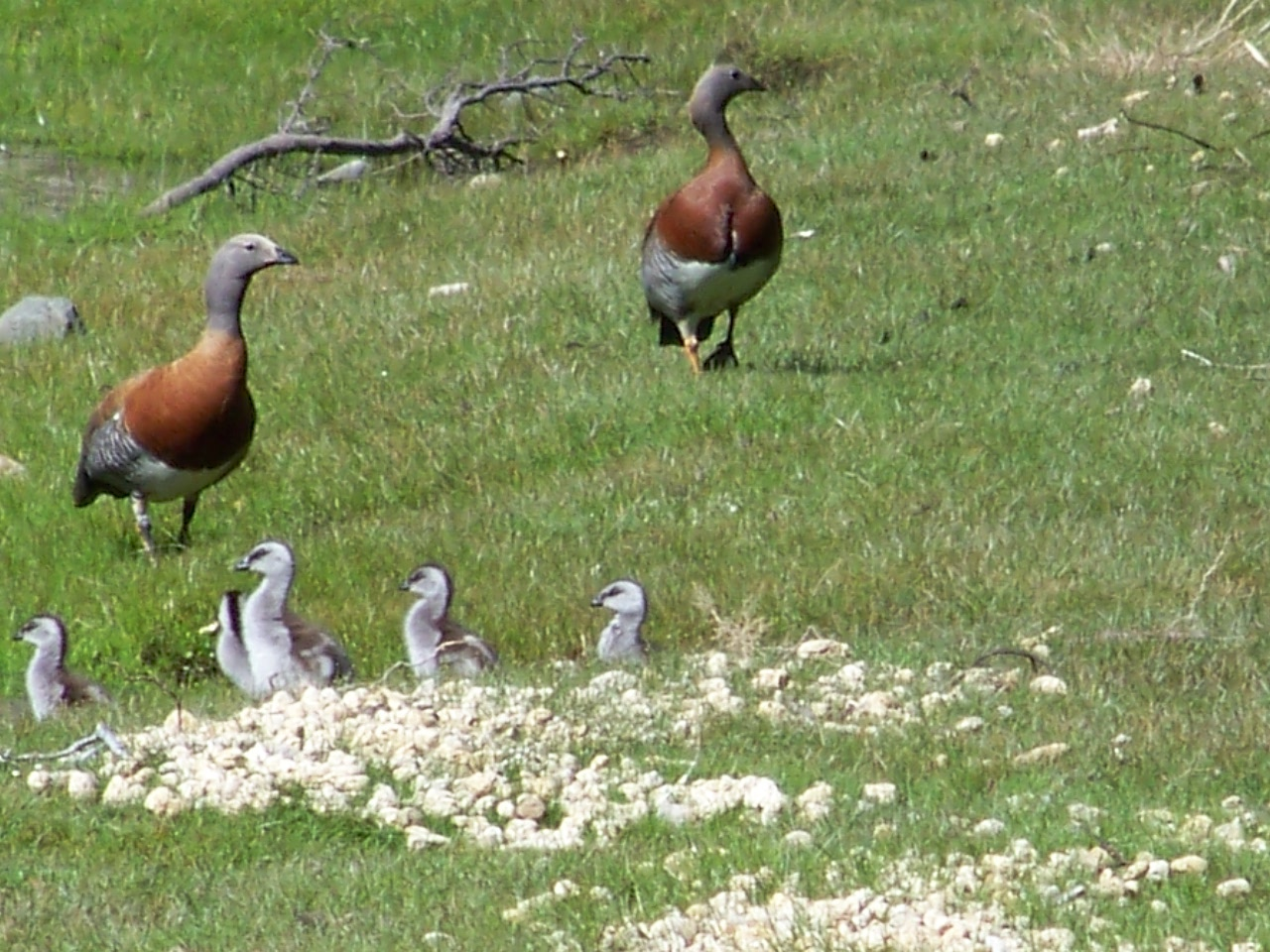 Pareja de abutardas y sus polluelos en Moquehue